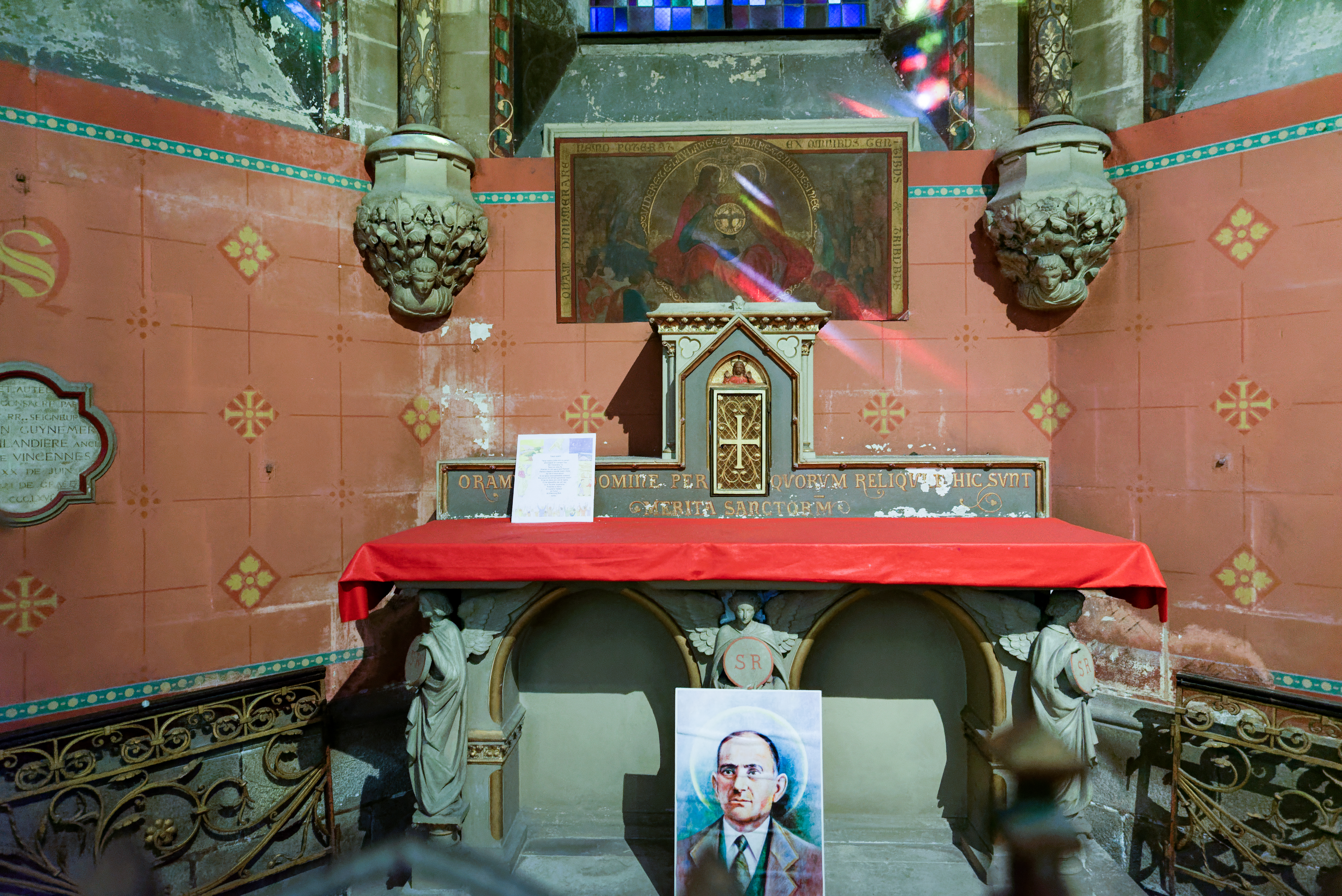 Basilique Saint-Nicolas. (Nantes, Loire-Atlantique, Pays de la Loire, France) .